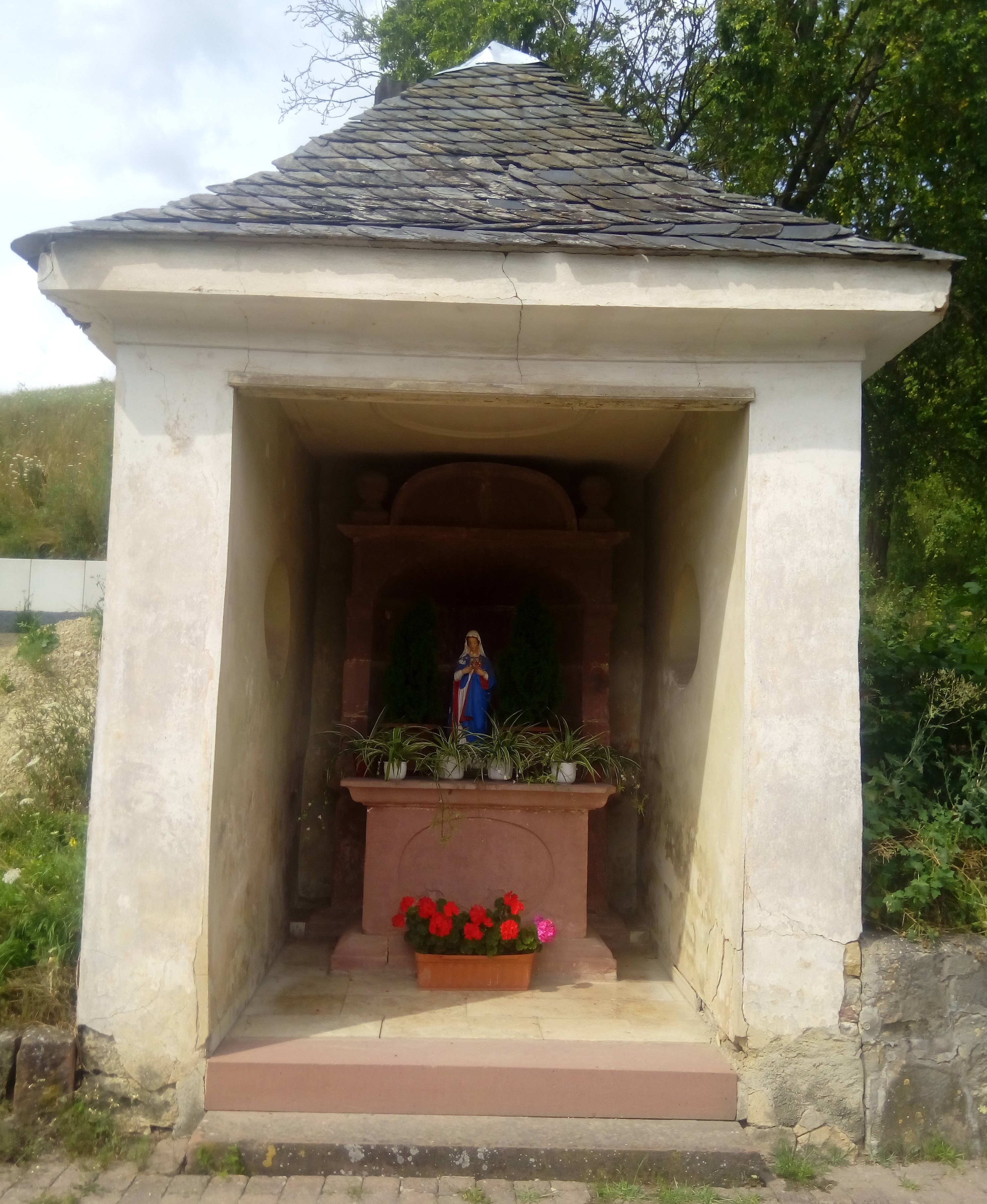 Bildstock in Gebäudeform - sogenannte Gartelkapelle - in Königheim. Ein Gewann ist nach der Gartelkapelle benannt.